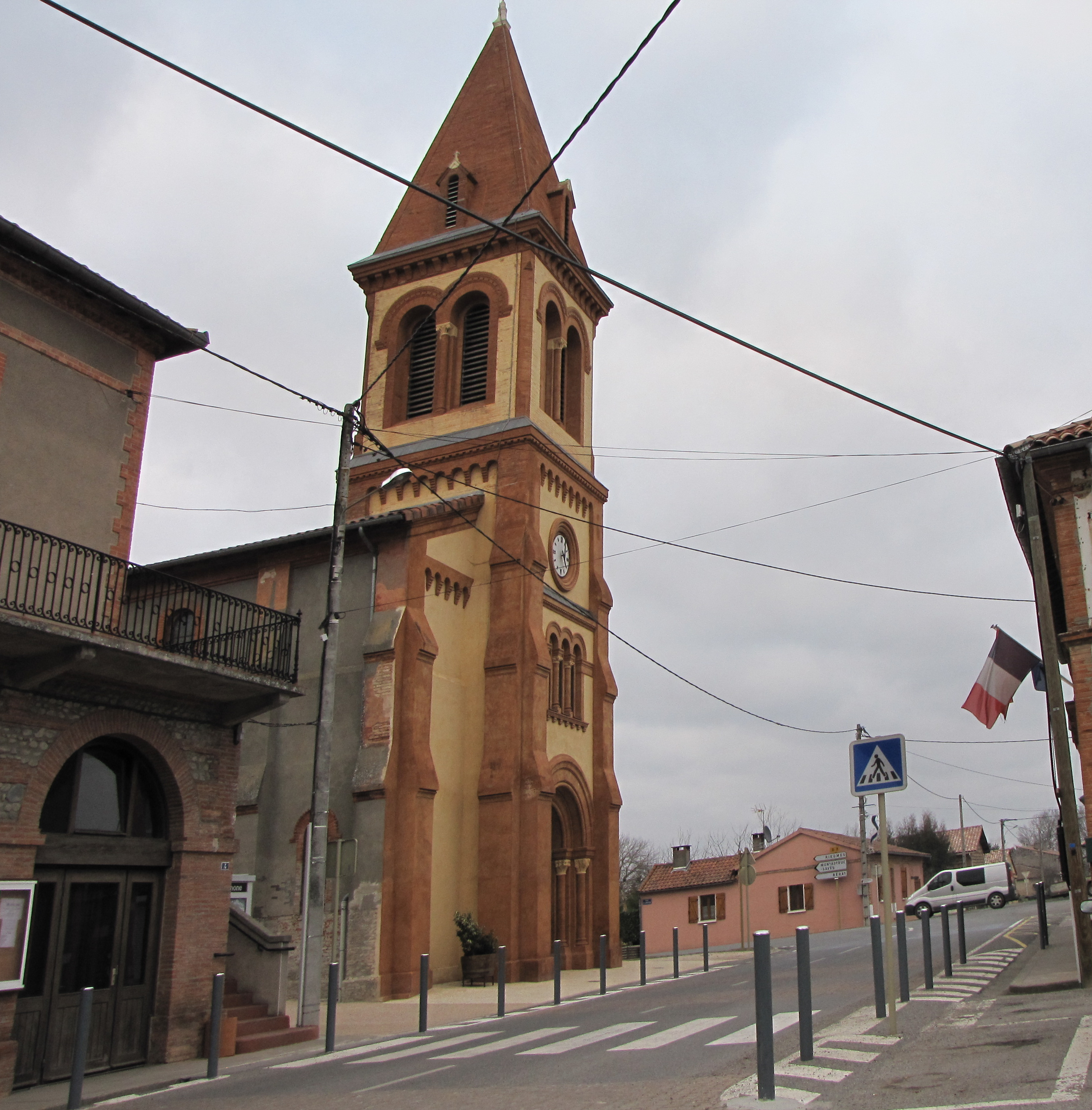 Église de Labastide-Clermont